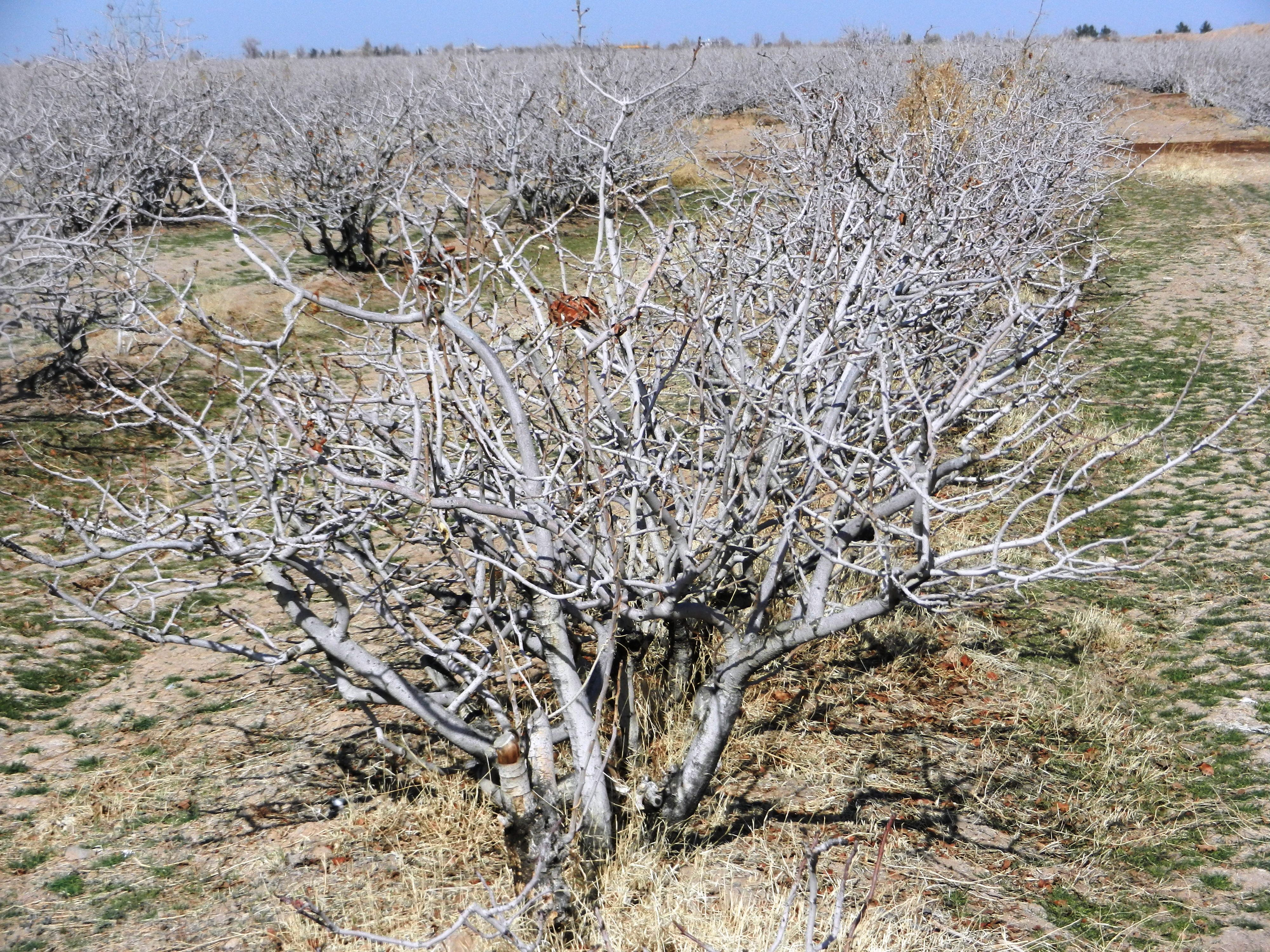 Plantaža pistacij v okolici Rafsanjana, Iran.